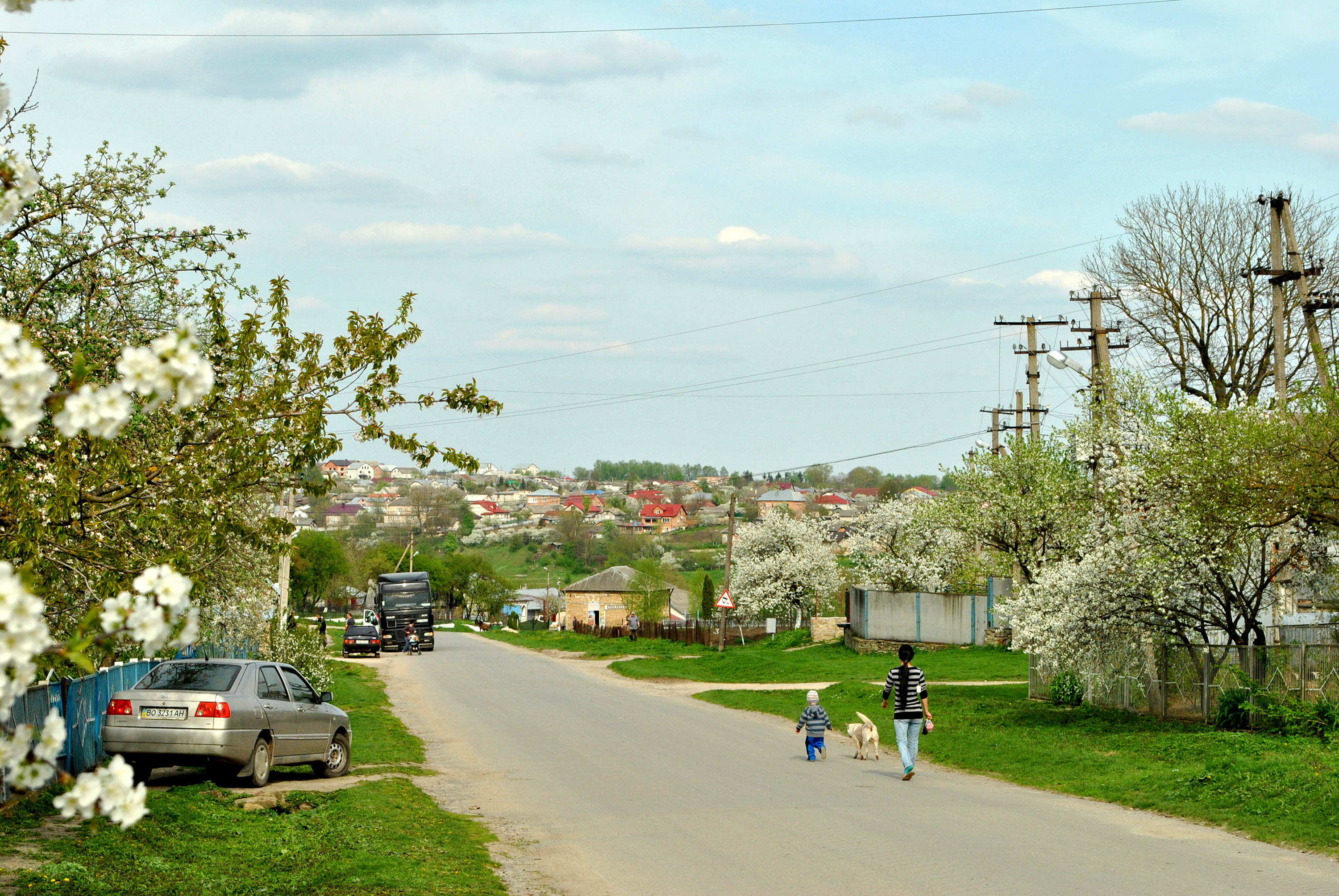 На одній з вулиць села Велика Лука Тернопільського району Тернопільської області. Автошлях С201508 «Хатки — Мишковичі»